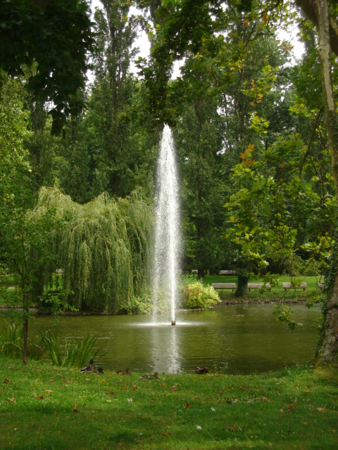 L'etan du jardin des Plantes du mans avec son jeyser